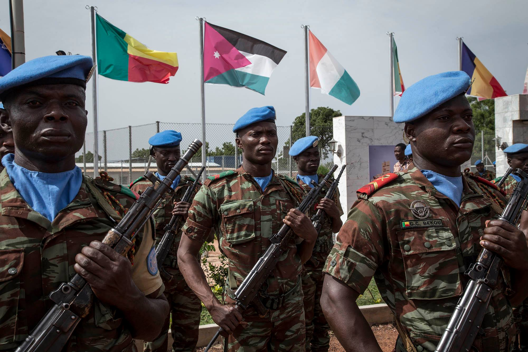 Des casques bleus (béninois) lors de la visite du secrétaire général de l'ONU, Antonio Guterres à Bamako, Mali, 30 mai 2018. (VOA/Kassim Traoré)